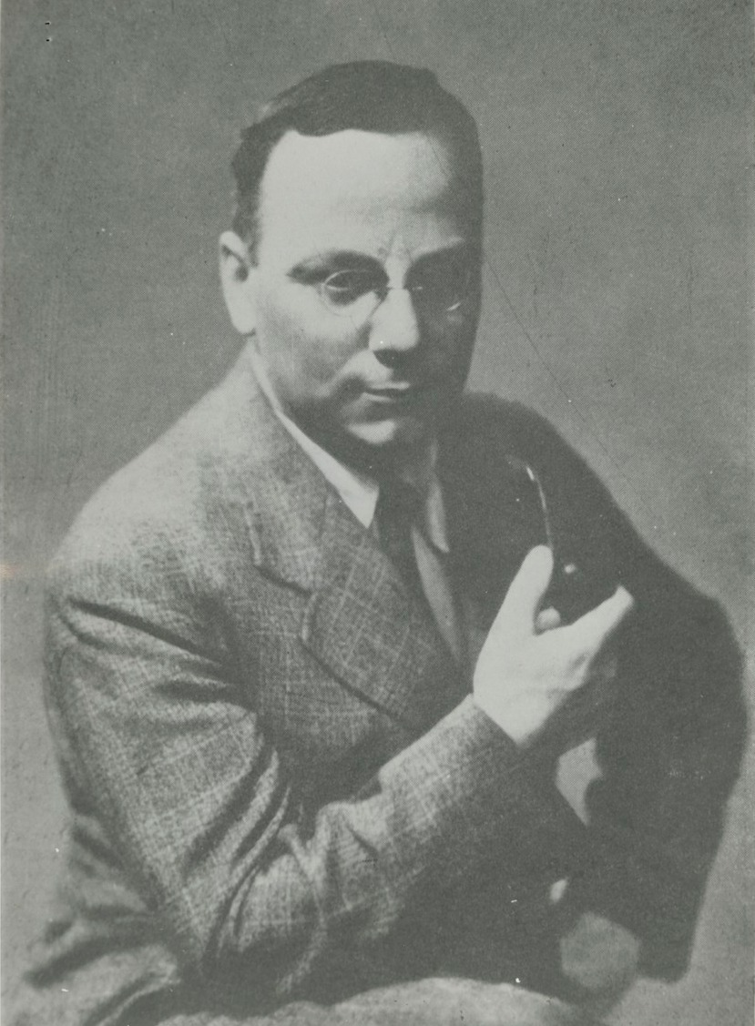 Jan Stanisław Bystroń